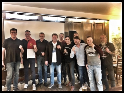 Meisterboxer bei Markus Keusgen